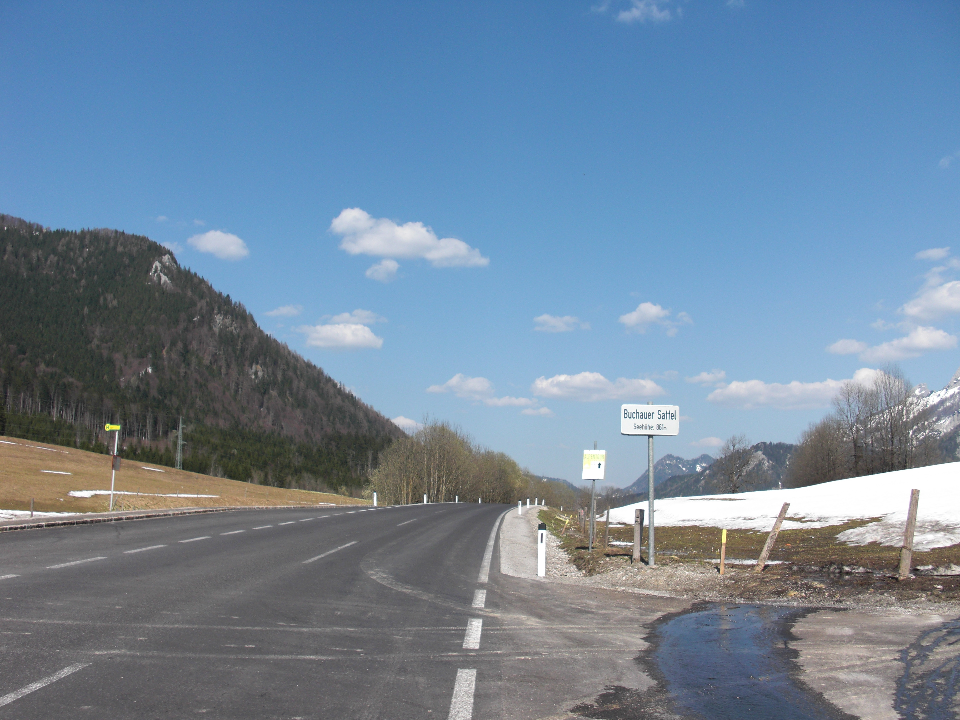 Passhöhe am Buchauer Sattel